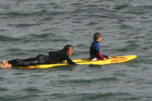 Paddleboarding